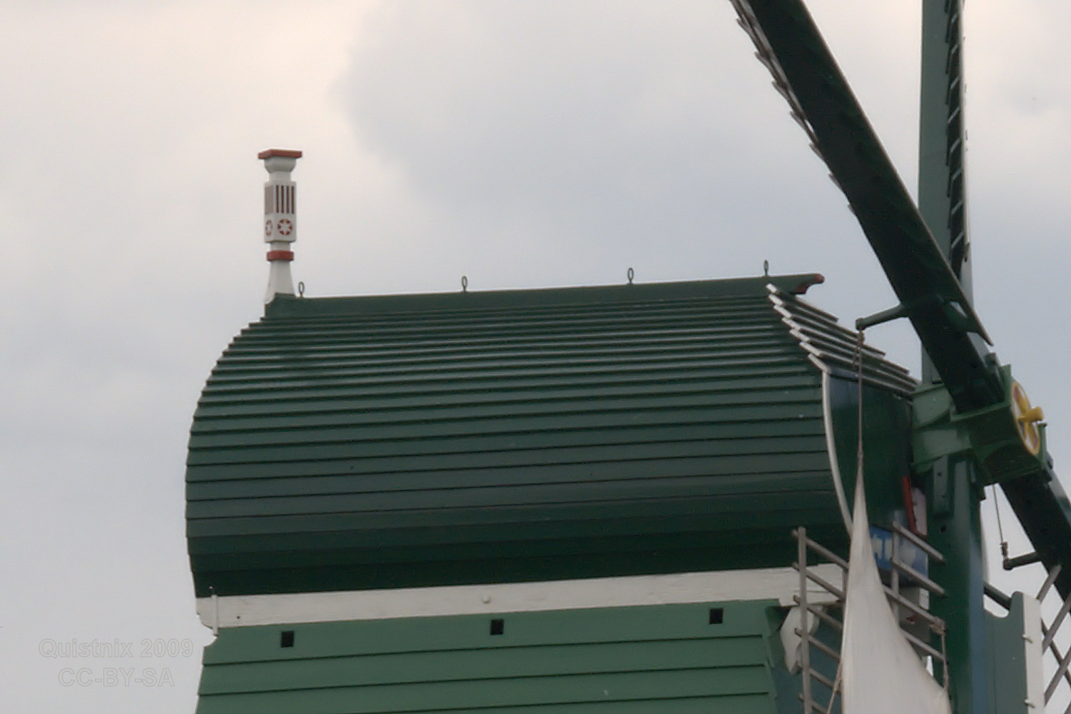 Zaanse Schans: Makelaar op de Gekroonde Poelenburg